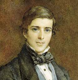 Hucks Gibbs, 1st Baron Aldenham